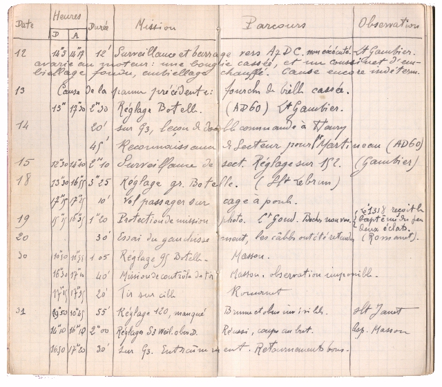 Carnet de Vol